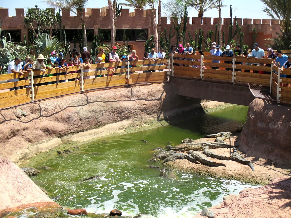 Un des bassins des crocodiles du Nil abrités à Crocoparc Agadir